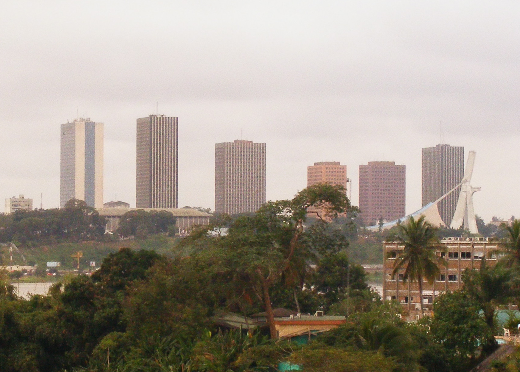 Vue de la cité administrative d'Abidjan depuis Cocody, en octobre 2009.